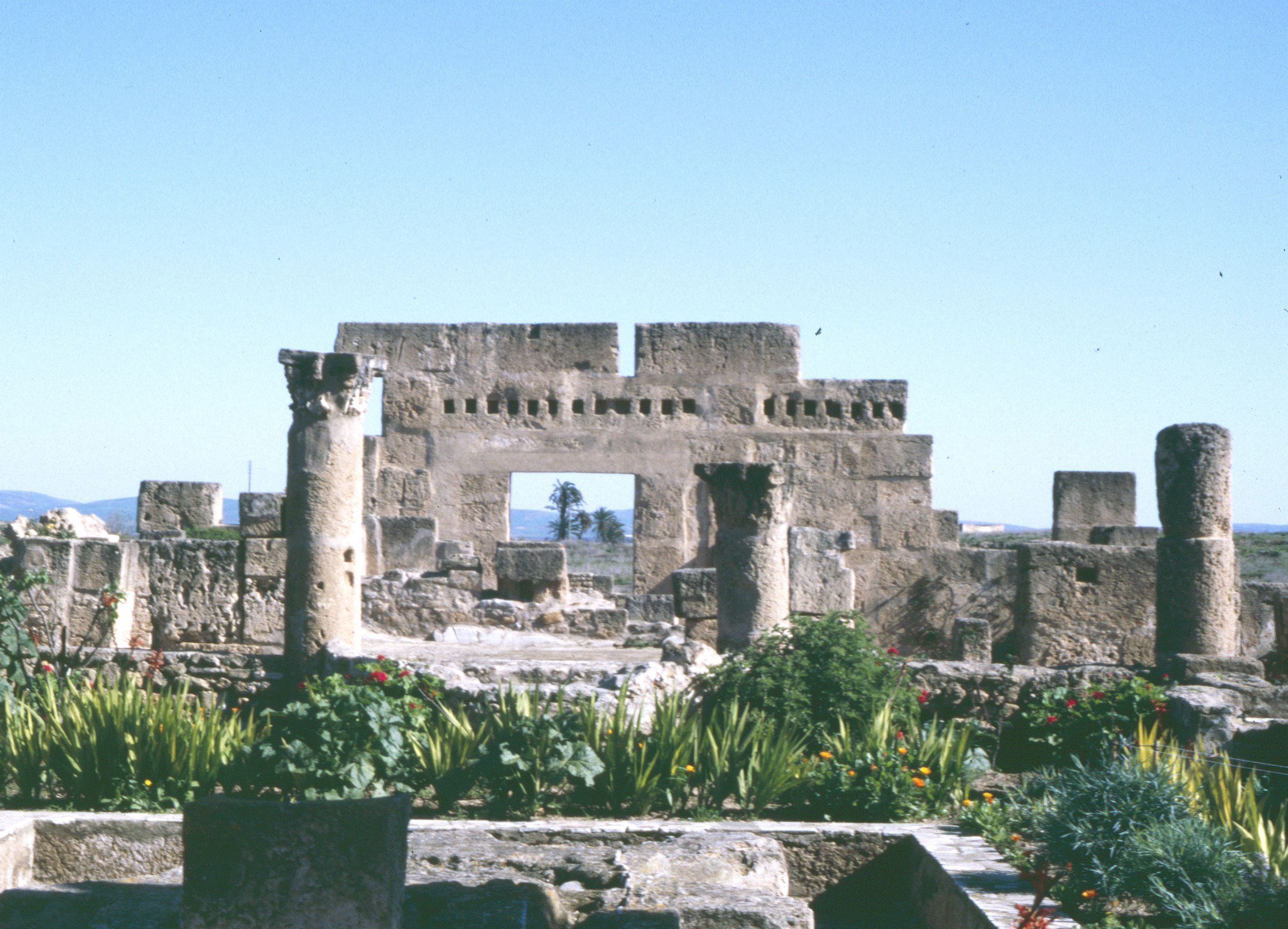 Utica (Tunesien)